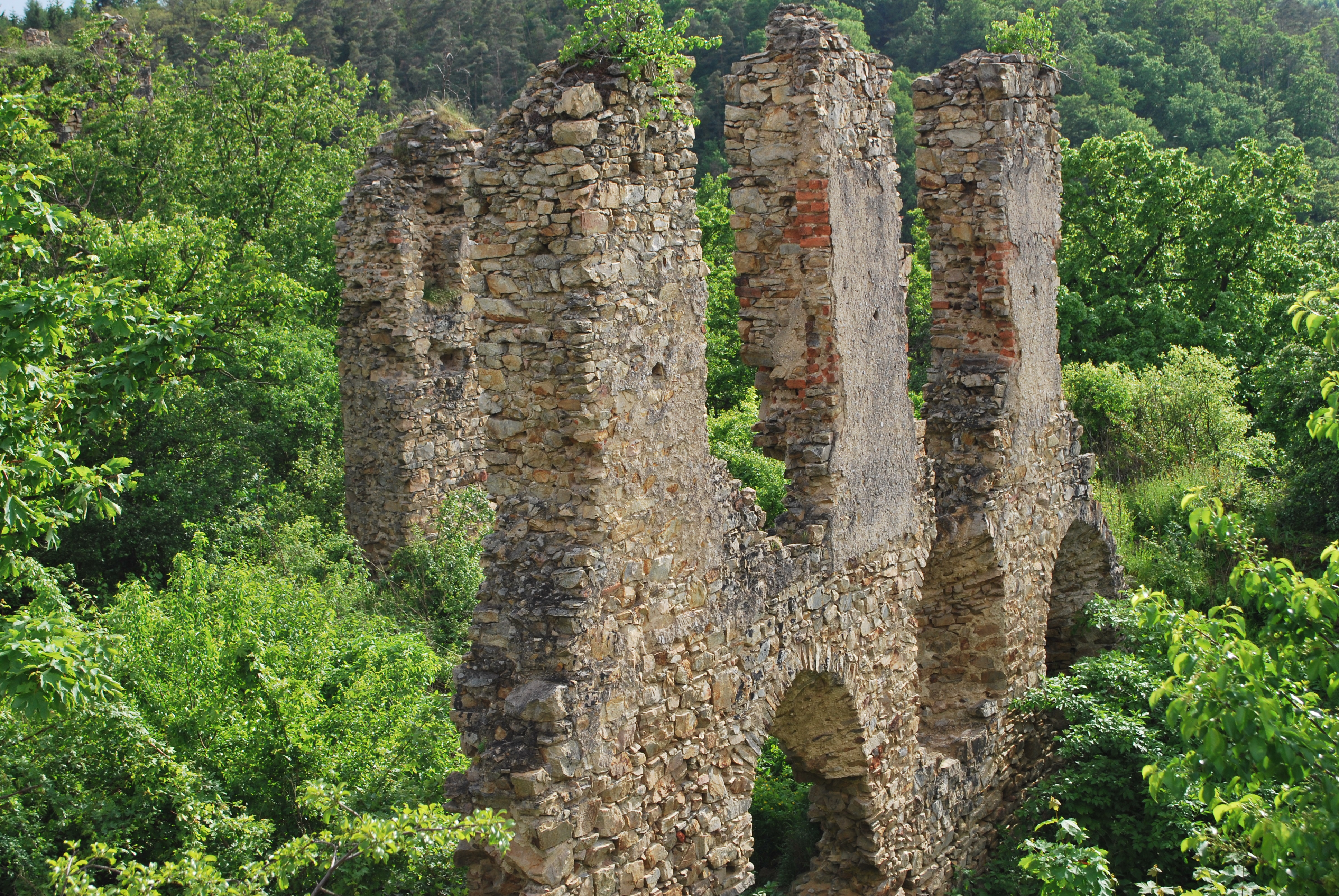 Templštýn-alibaba